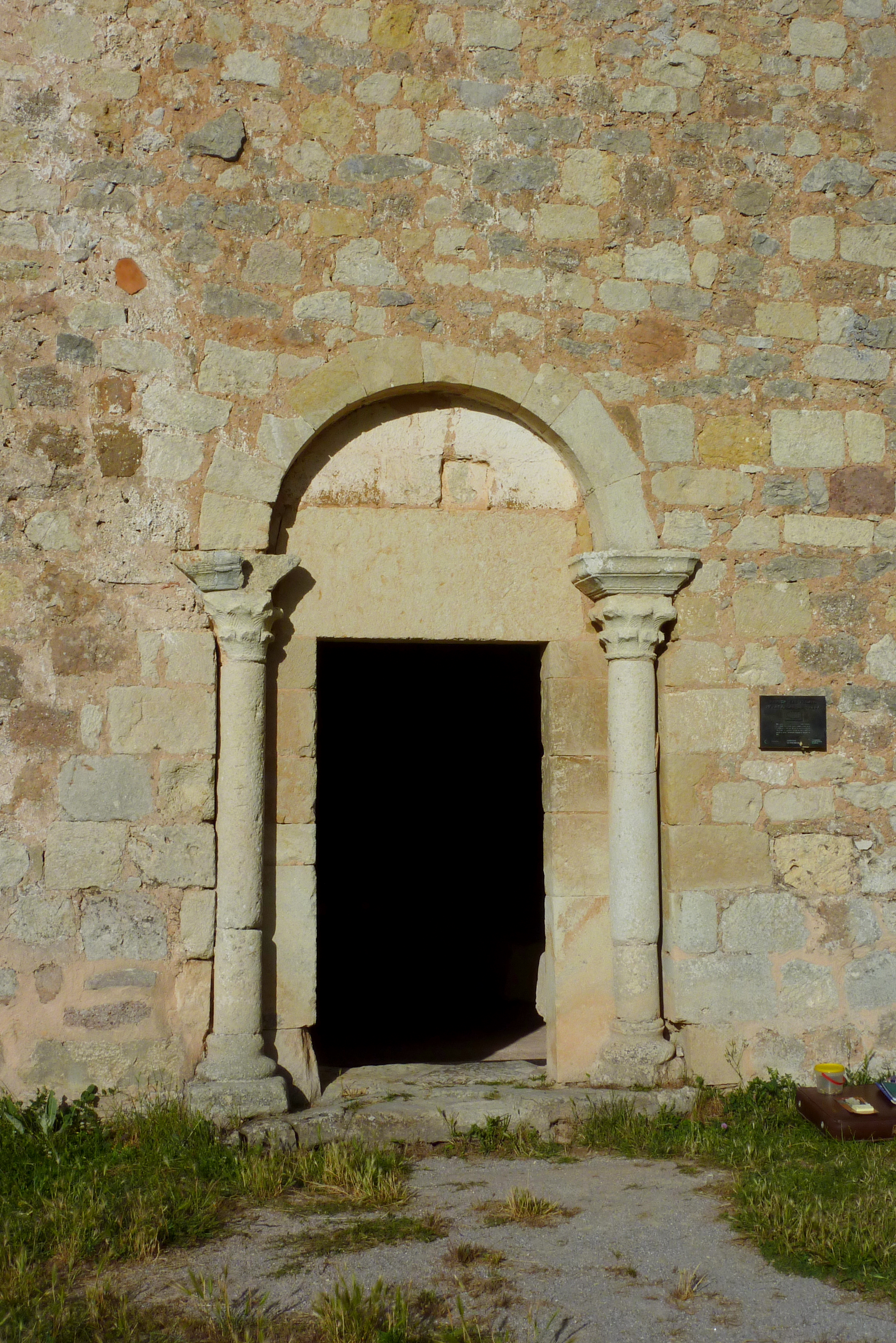 Ermita de San Pelayo in Perazancas de Ojeda, einem Ortsteil von Cervera de Pisuerga in der Provinz Palencia (Kastilien-León/Spanien), Portal